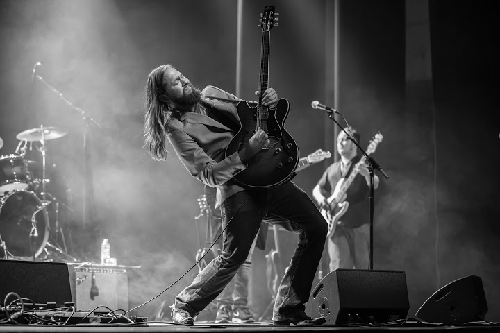 Leif de Leeuw met de Leif de Leeuw Band in Overpelt, België.